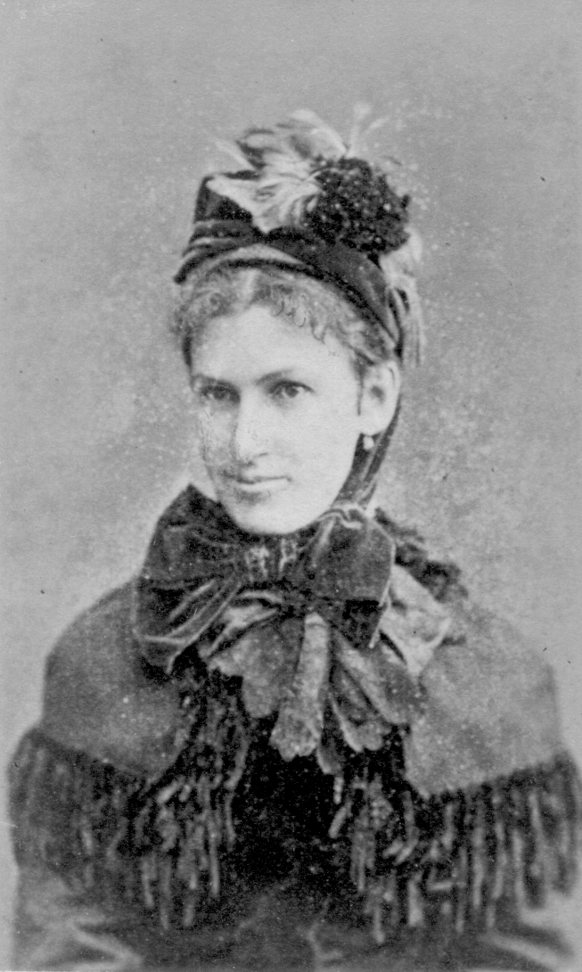 Emma Krackowizer, geb. Würtenberger (1849-1936), verheiratet mit Ferdinand Krackowizer (Landesarchivdirektor in Linz). Beschriftung in Kurrentschrift auf Rückseite der Fotografie: Emma Würtenberger, geboren 8. Dezbr. 1850 in Salzburg, getraut 26. April 1870 in Salzburg mit Dr. Ferdinand Krackowizer